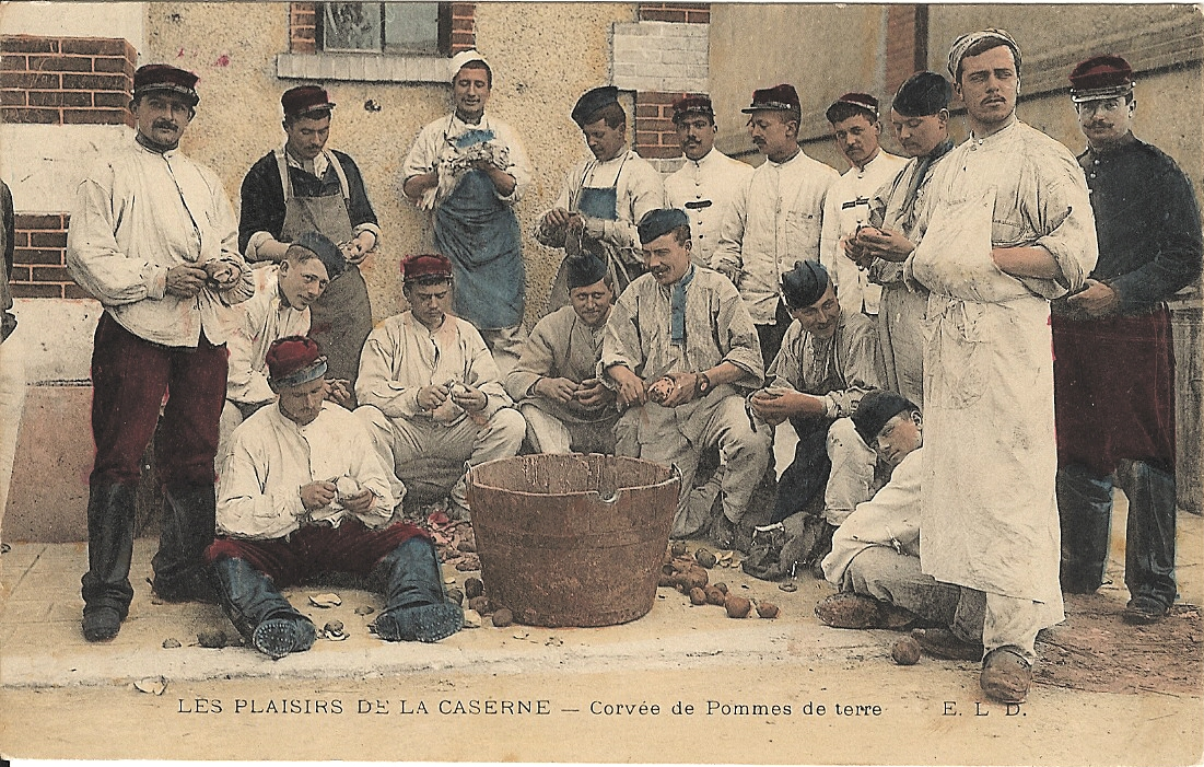 Corvée d'épluchage des pommes de terre dans une caserne